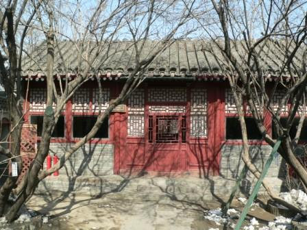 鲁迅故居的庭院和正房 2005年2月26日拍摄于北京鲁迅纪念馆